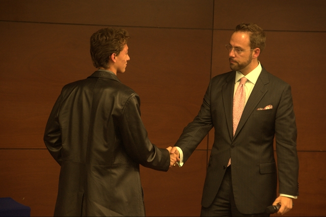 Alvaro Gordoa demonstrando técnica de saludar en el ITESM-Campus Ciudad de México